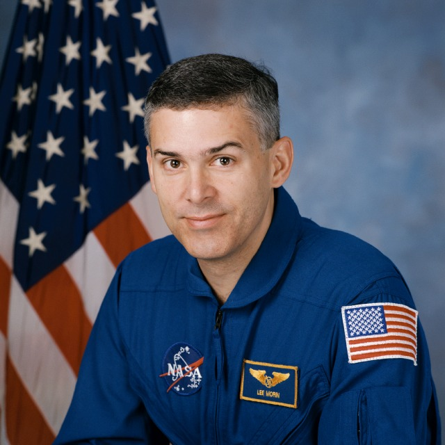 portrait astronaut Lee Morin